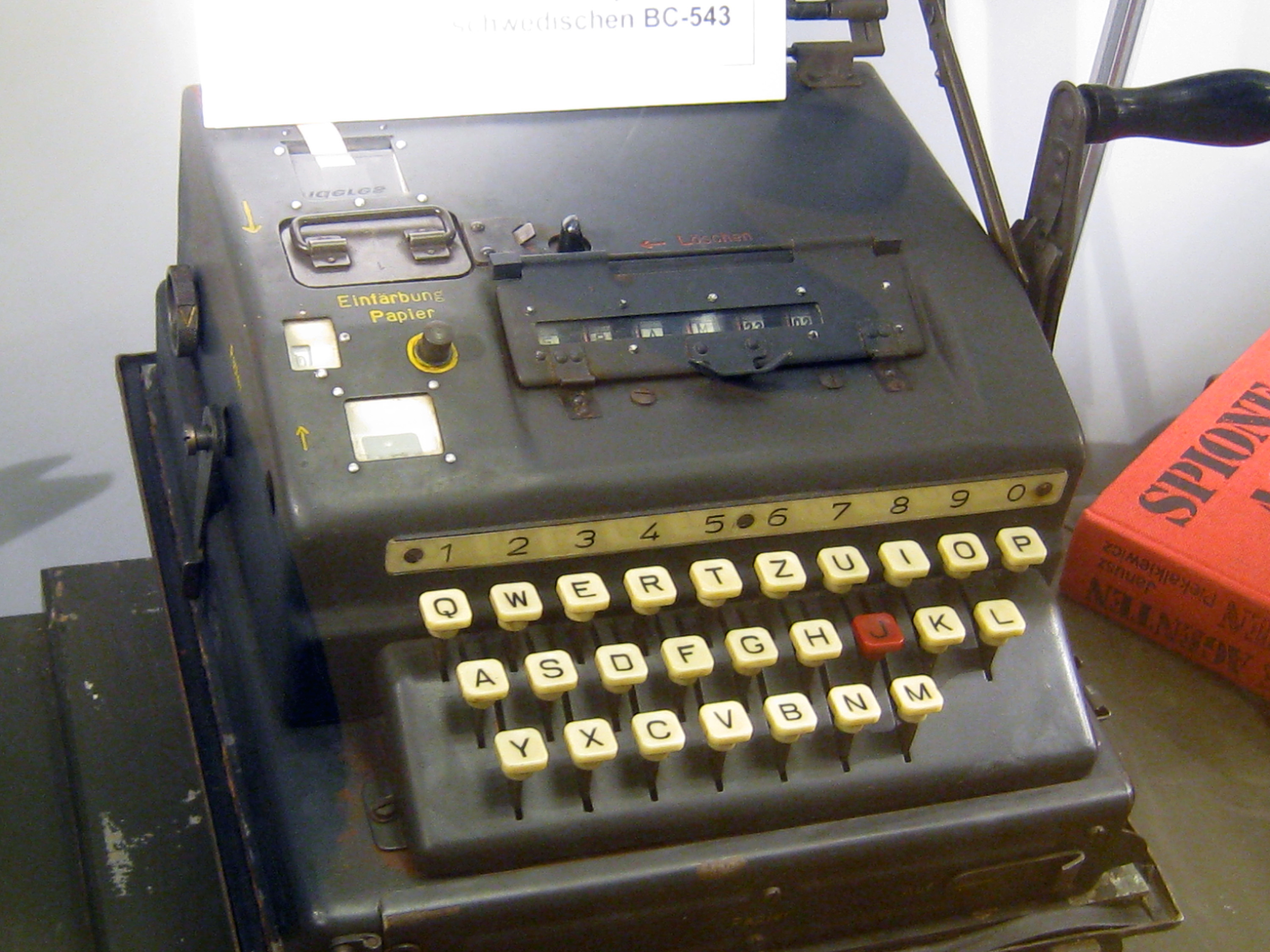 Schlüsselgerät 41 "Hitlermühle" der deutschen Wehrmacht im Festungsmuseum Reuenthal